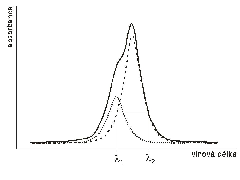 Multikomponentní analýza ve spektrofotometrii